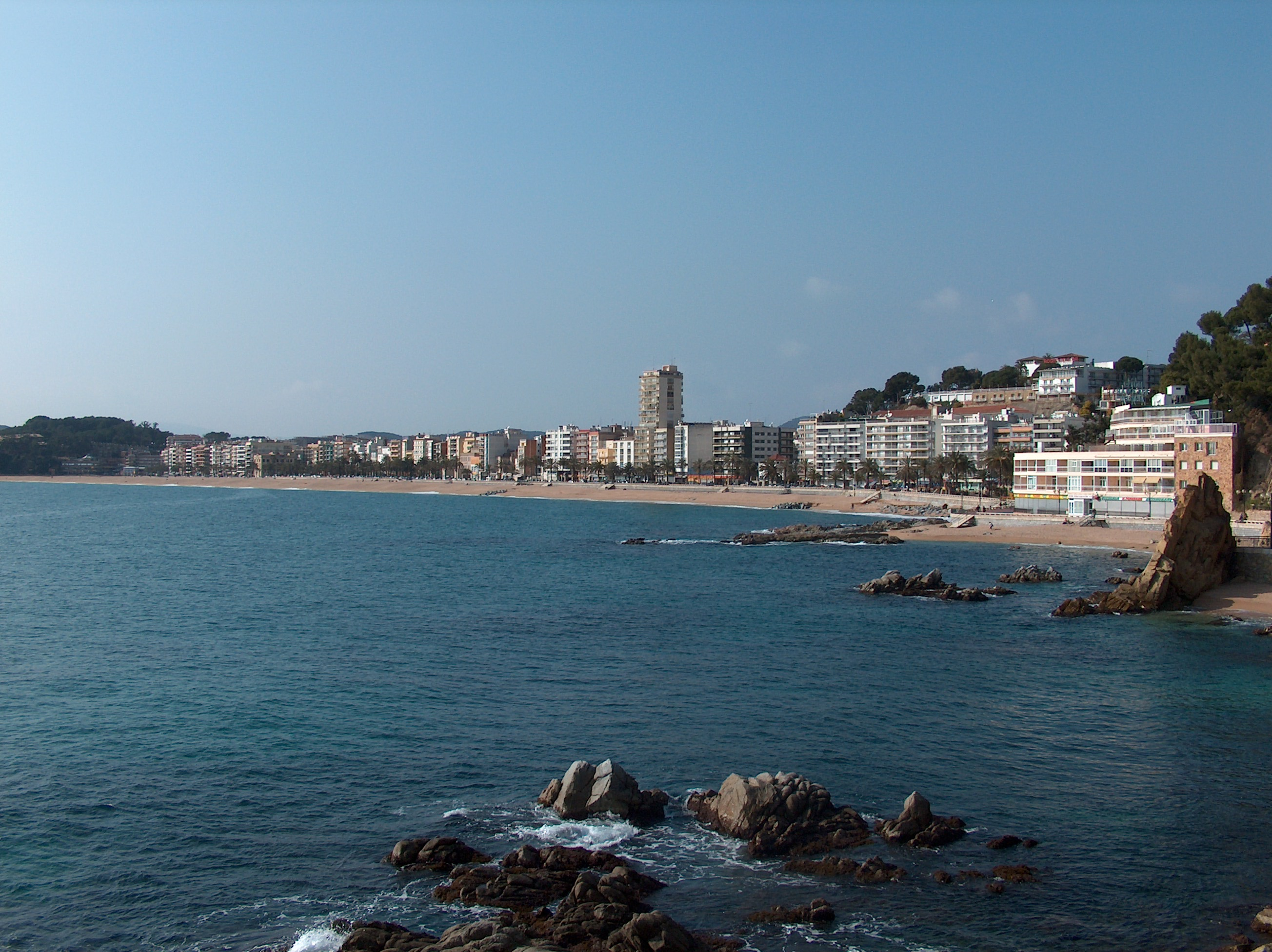 Platja de Lloret (Lloret de Mar) This is a a photo of a beach in Catalonia, Spain, with id: PL-CT-17003-148